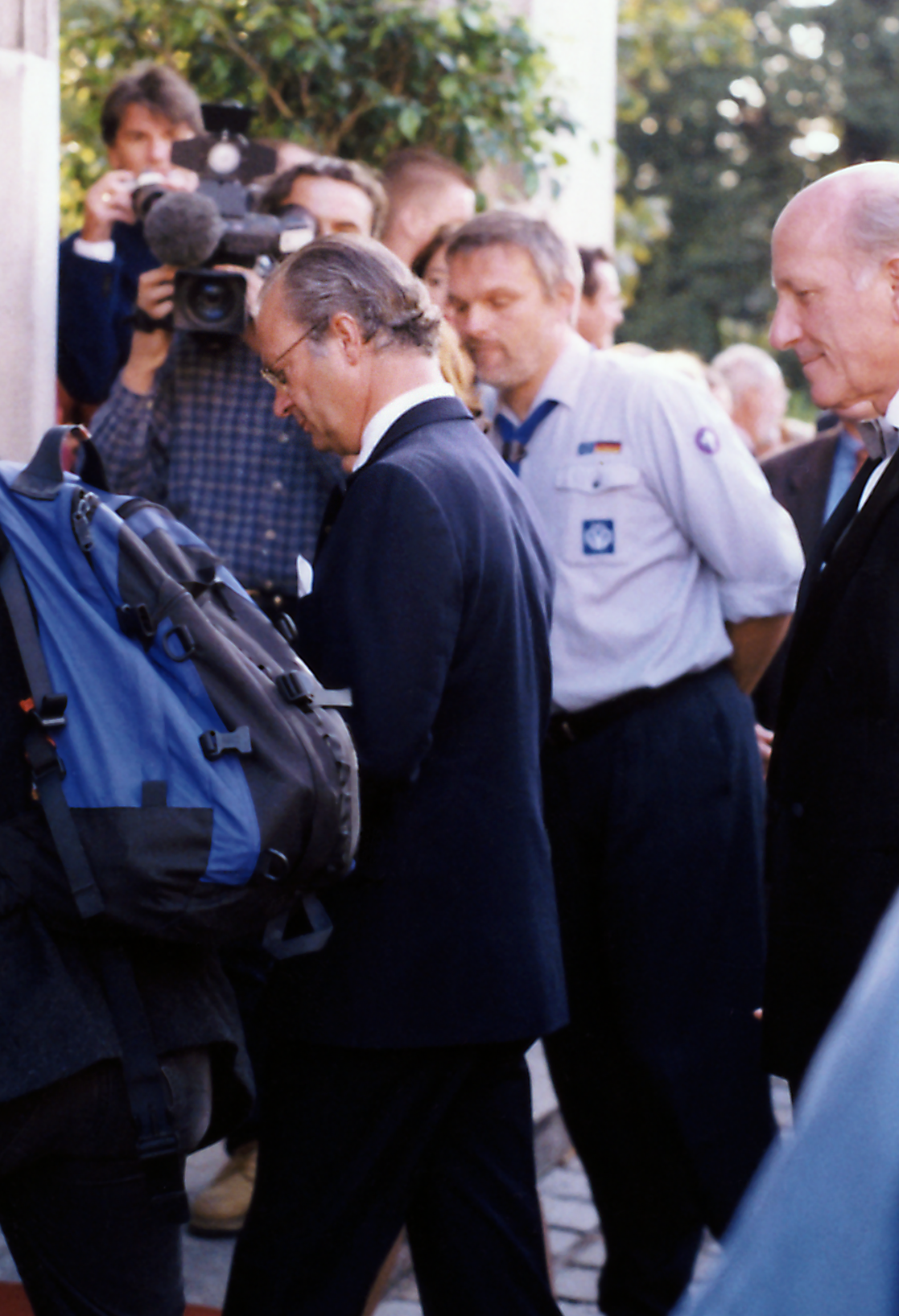 Scout-Gala der World-Scout-Foundation in München. König Carl XVI. Gustaf auf der Freitreppe des Prinzregententheaters in München. Der ehemalige Stammesfeldmeister des Stammes Ägypten ist als offizieller Pressevertreter der unabhängigen Pfadfinderzeitschrift Scouting zur Veranstaltung und dem anschließenden Empfang im Prinzregententheater geladen. Nach der Gala führte die Münchener Diözesanvorsitzende der Deutschen Pfadfinderschaft St. Georg (DPSG) ein veröffentlichtes Interview mit Scouting.